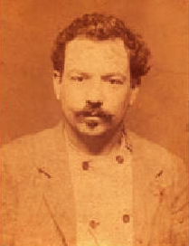 Louis Restiaux (ca 1897)